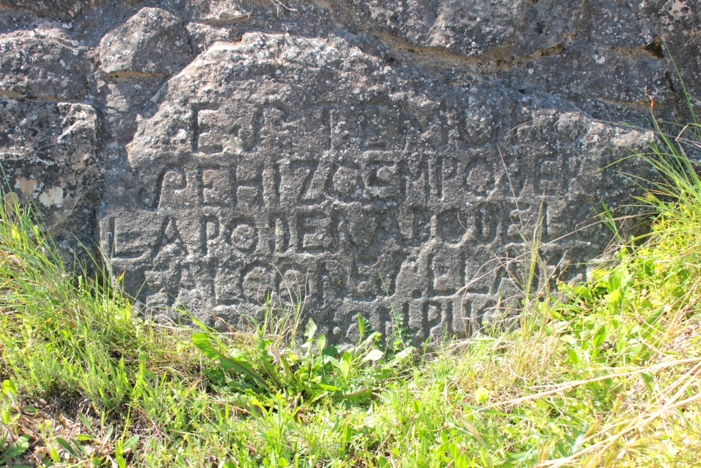 Inscripción en el muro de la presa de Román (Jumilla)